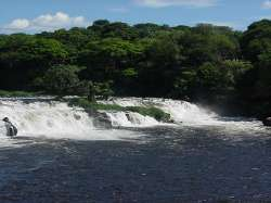 Caida de agua del parque Cachamay, Puerto Ordaz Venezuela.